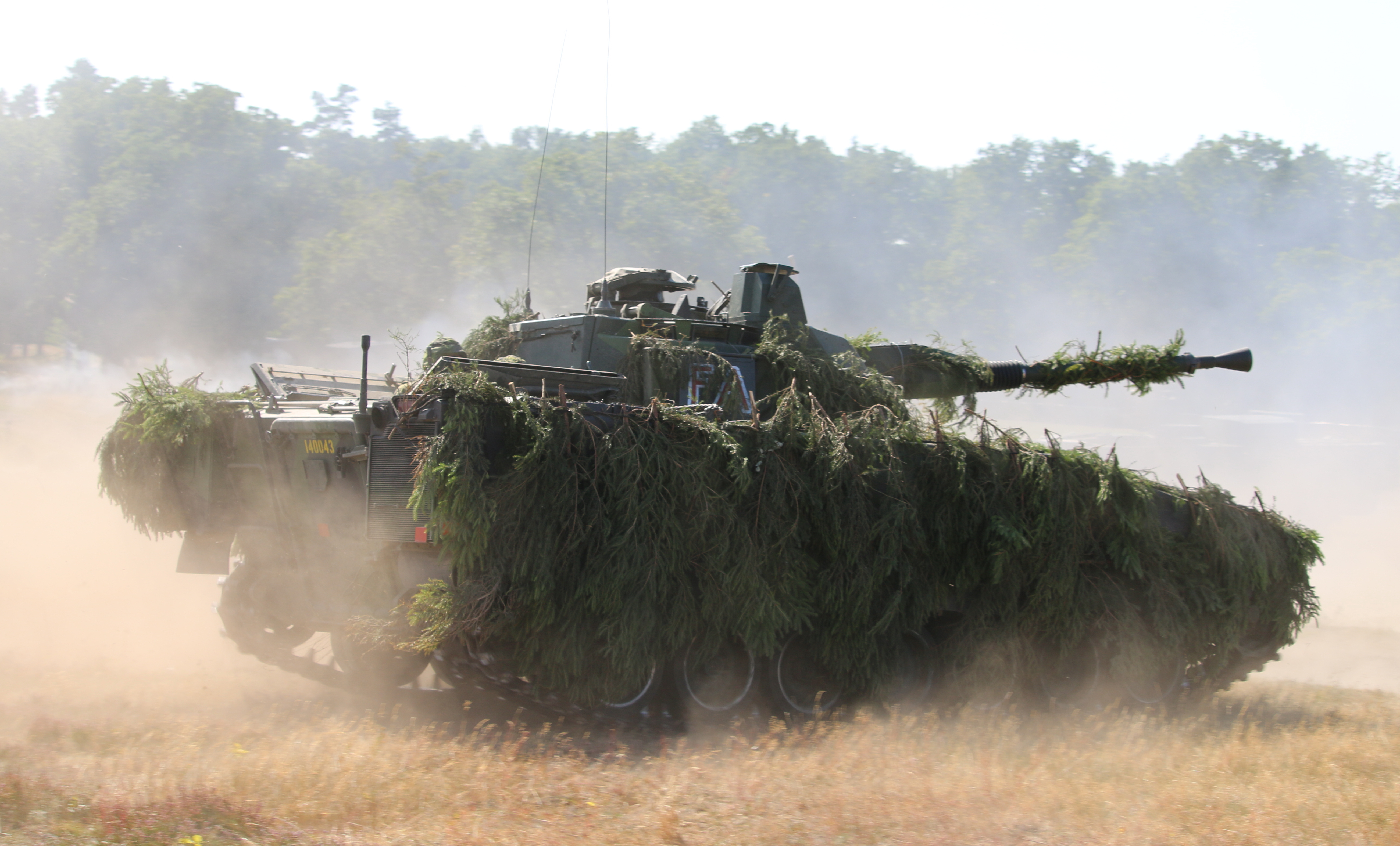 Stridsfordon 9040 Revinge 2015